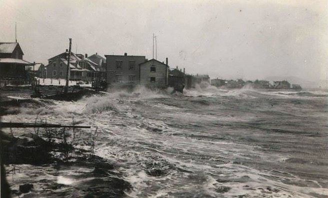 Sainte-Anne-des-Monts - 1934 Raz-de-marée ou grande marée